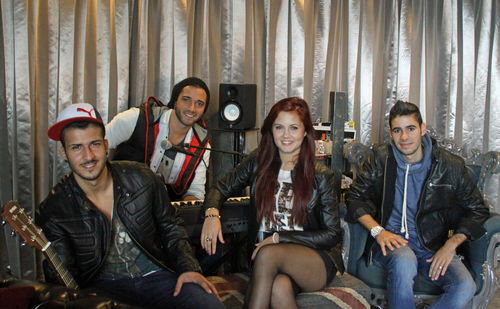 Melouria